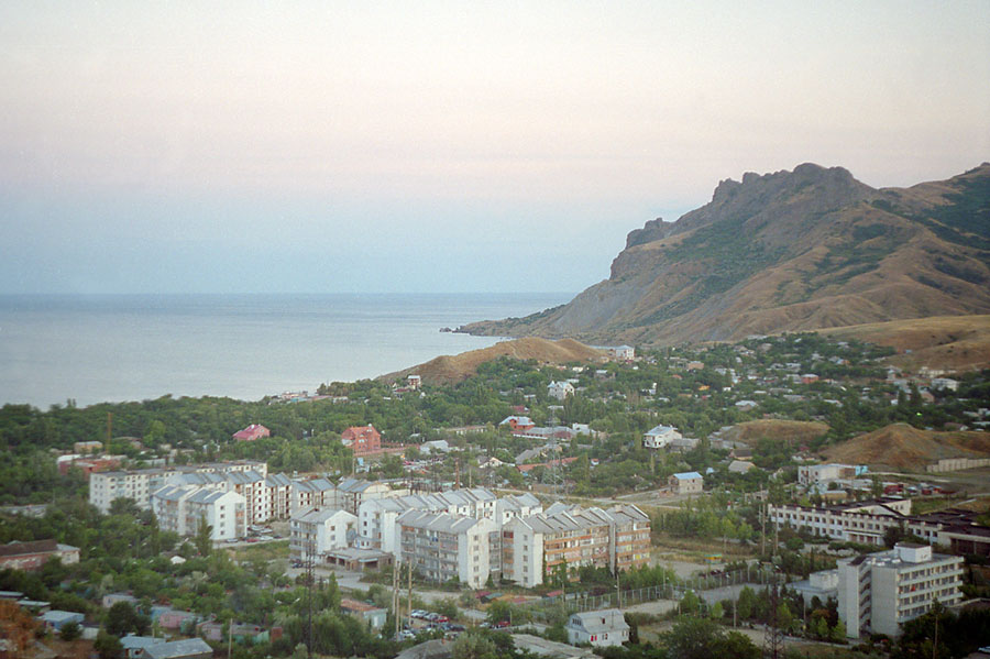 Panorama of Koktebel. Kara-dag is in right side